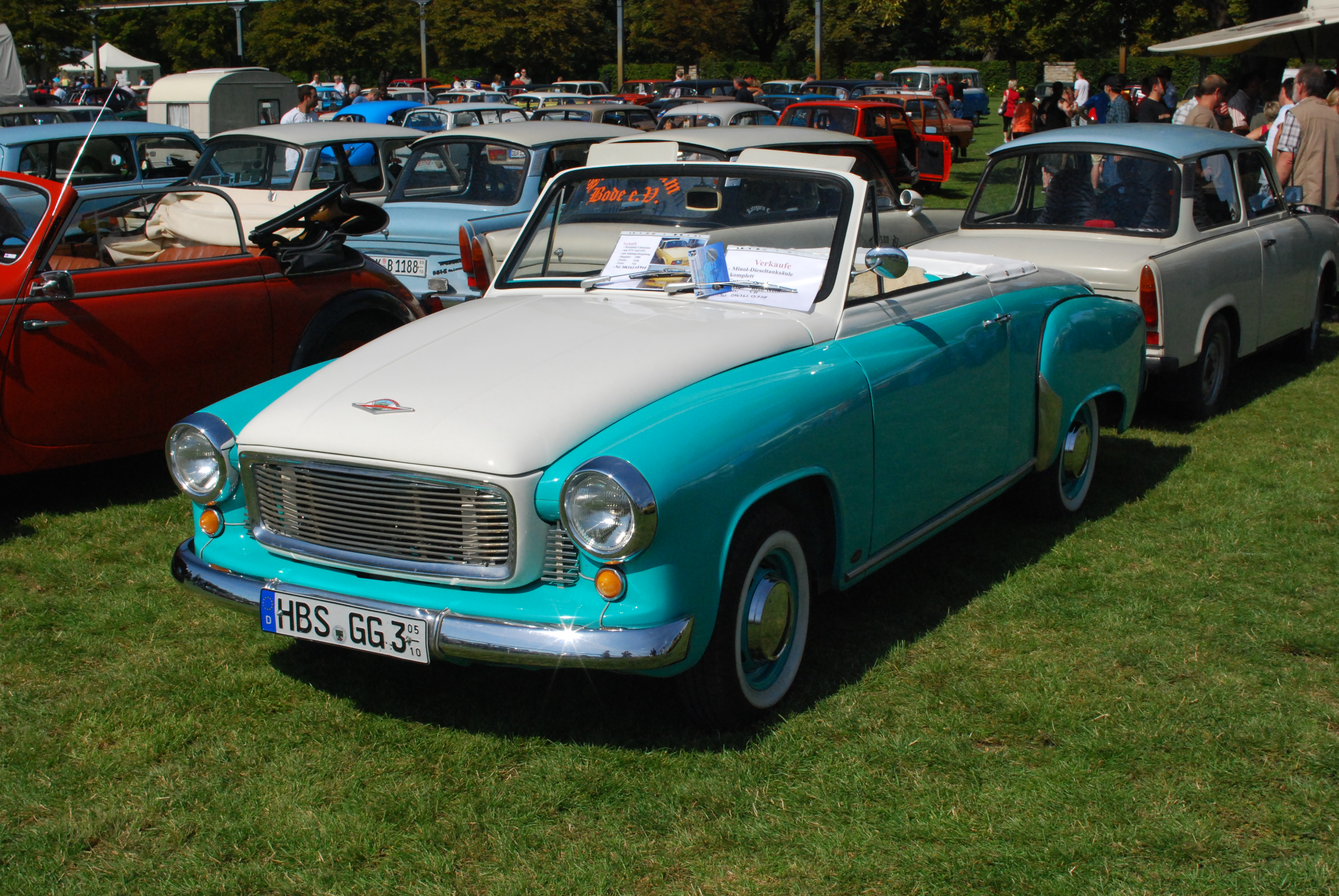 Wartburg 312-300 HT Fotos von der OMMMA 2011 am 03.09.2011 im Magdeburger Elbauenpark